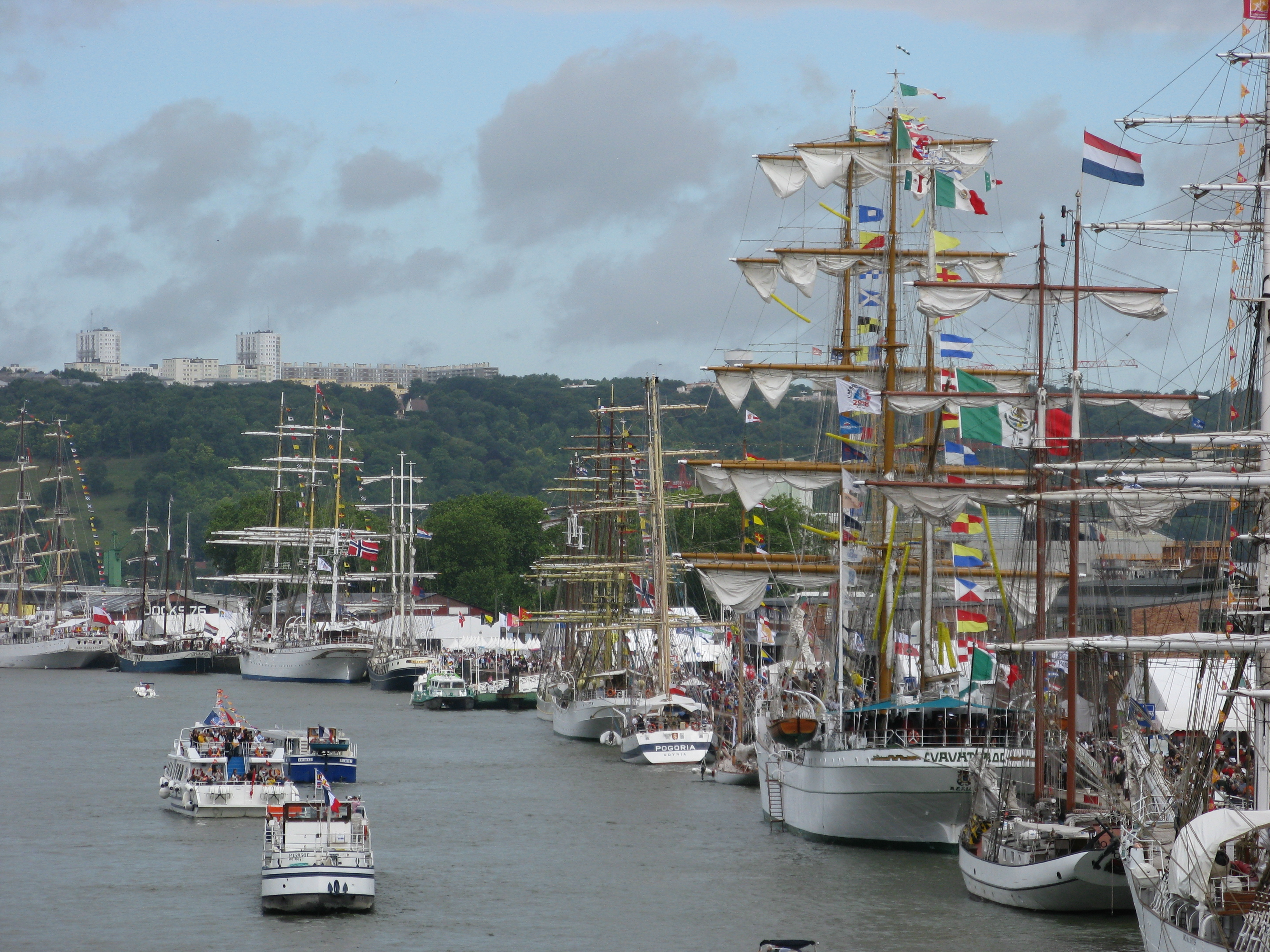 Armada Rouen 2008 Vue générale